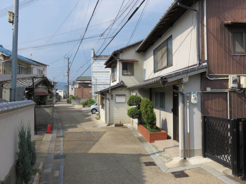 姫路市野里にある「ノコギリ横丁」。真っ直ぐではなく鋸の刃のようにギザギザになっている。